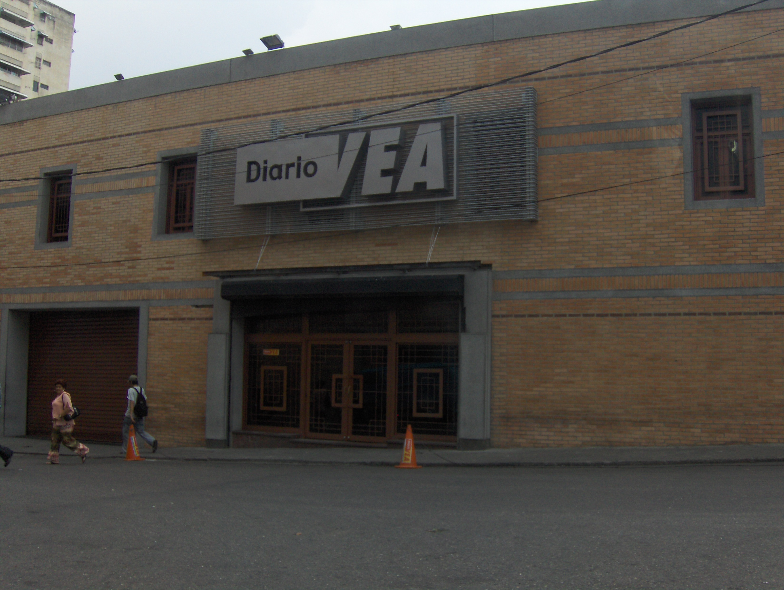 Diario Vea